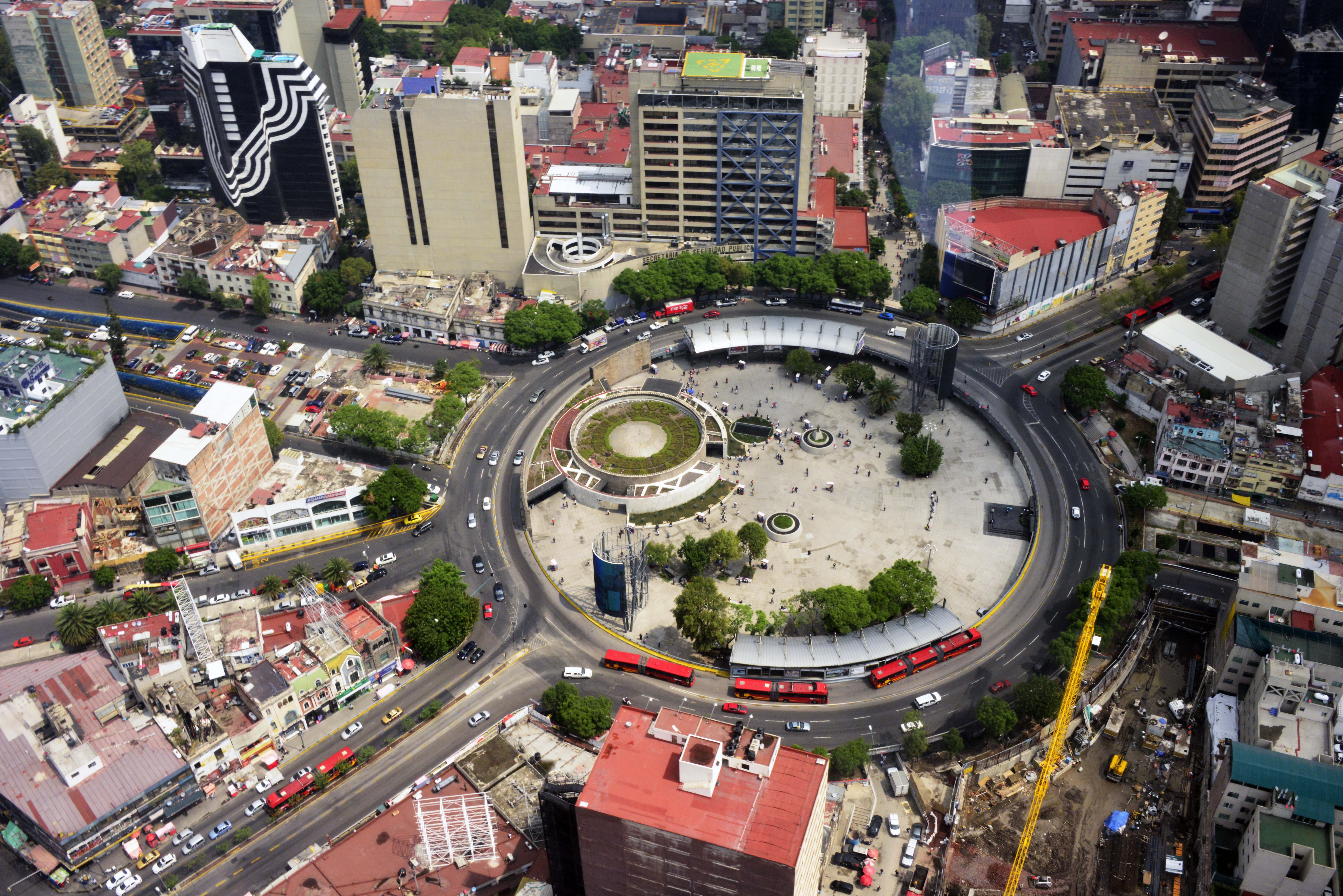 Glorieta de Insurgentes desde el aire